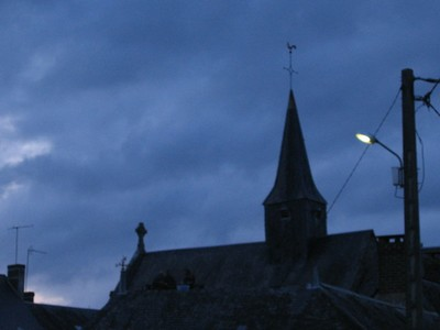 Eglise de Lavernat à la tombée de la nuit.